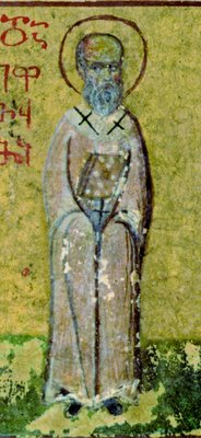 Српски (ћирилица): Јевтимије Исповедник минијатура са Свете горе, Манастир Ивирон с краја 15. века. Сада у Русији